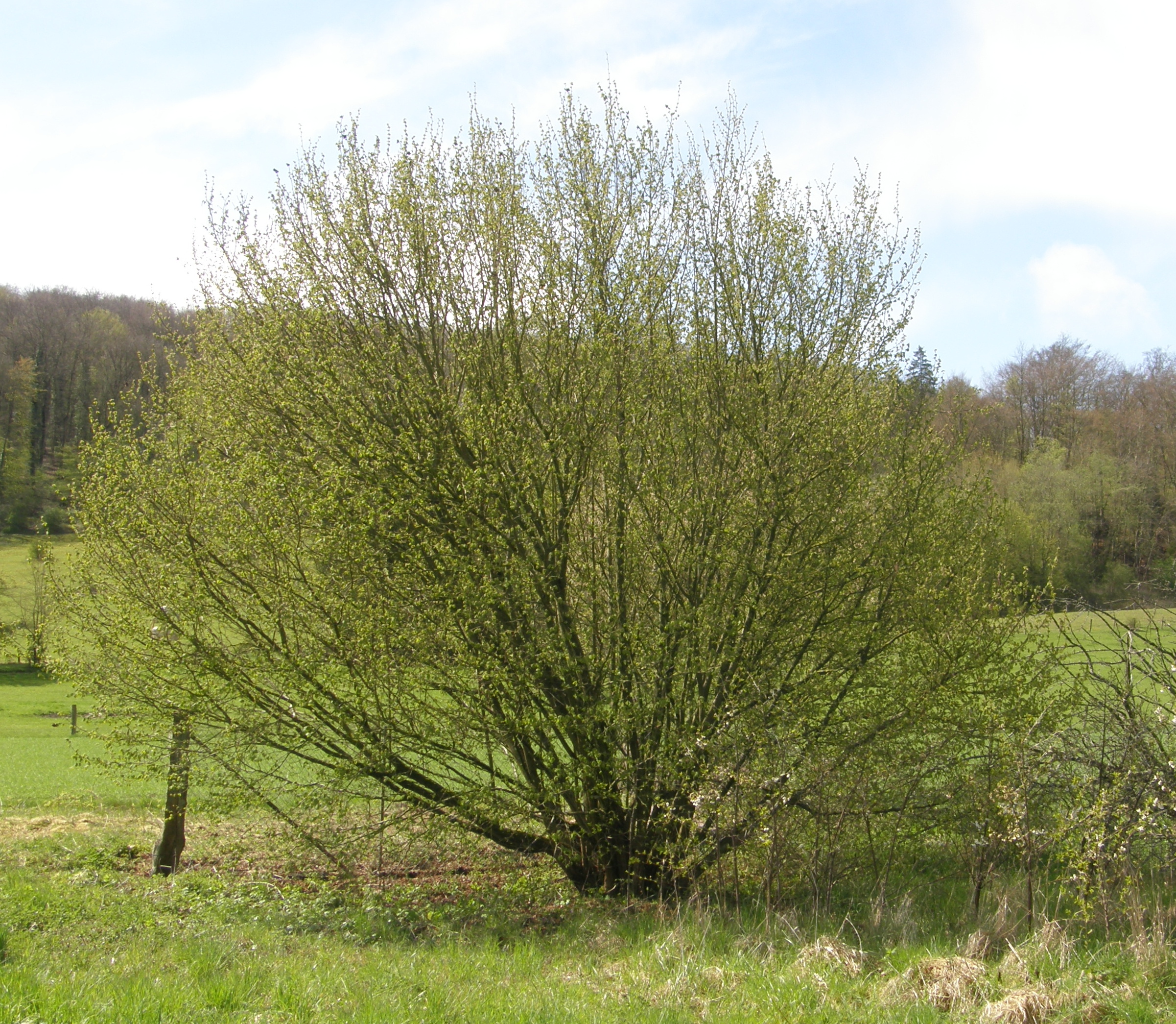 Port d'un noisetier cultivé. Eclosion des bourgeons, à la fin du mois d'avril.